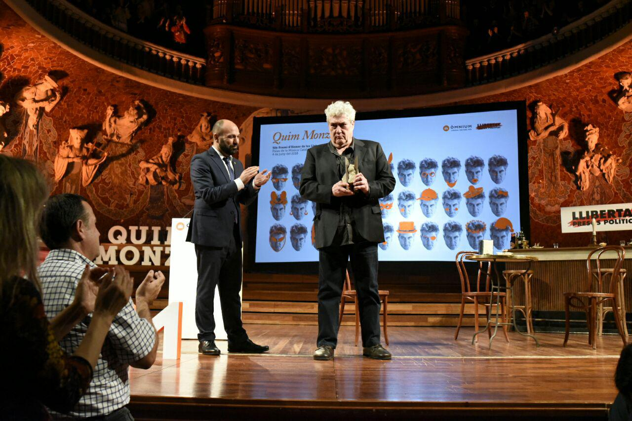 Quim Monzó rep el 50è Premi d'Honor de les Lletres Catalanes al Palau de la Música Catalana el 4 de juny de 2018. Per primera vegada a la història d'Òmnium, el president no pot entregar el guardó al premiat: Jordi Cuixart és a la presó des del 16 d'octubre de 2017.